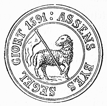 Assens' købstadssegl